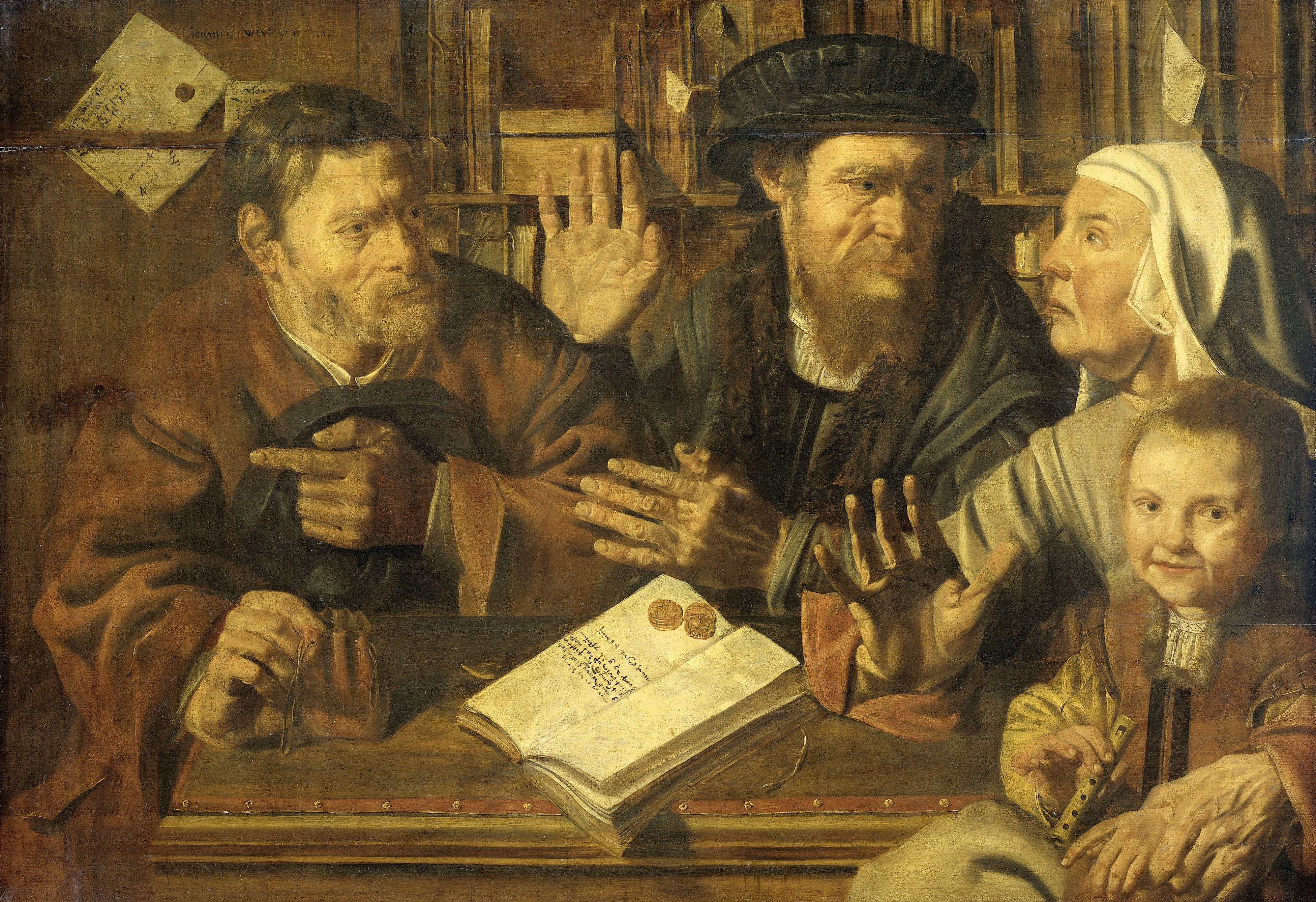 Het kantoor van de notaris. Een klerk of boekhouder in onderhandeling met links een man met een geldzakje en rechts een vrouw met een jongetje met een fluit op schoot. In het midden een tafel waarop een kasboek en enkele munten liggen. Op de achtergrond een boekenkast en verzegelde documenten aan de muur.